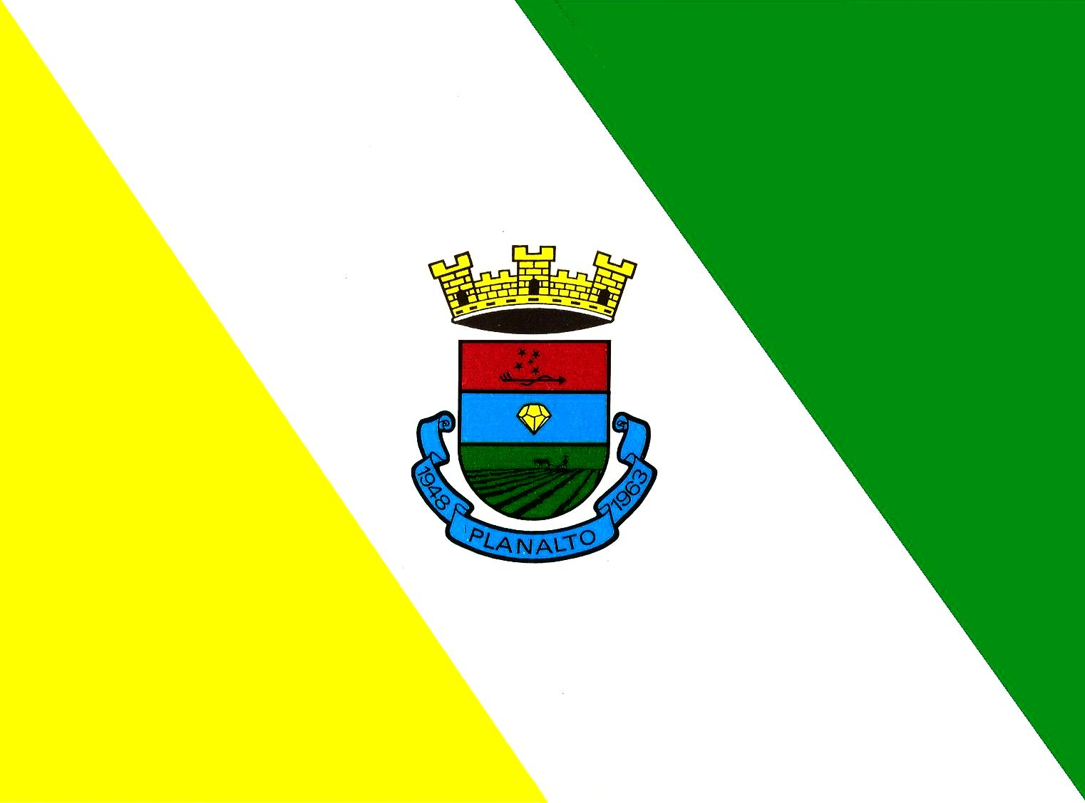 Bandeira Planalto-RS